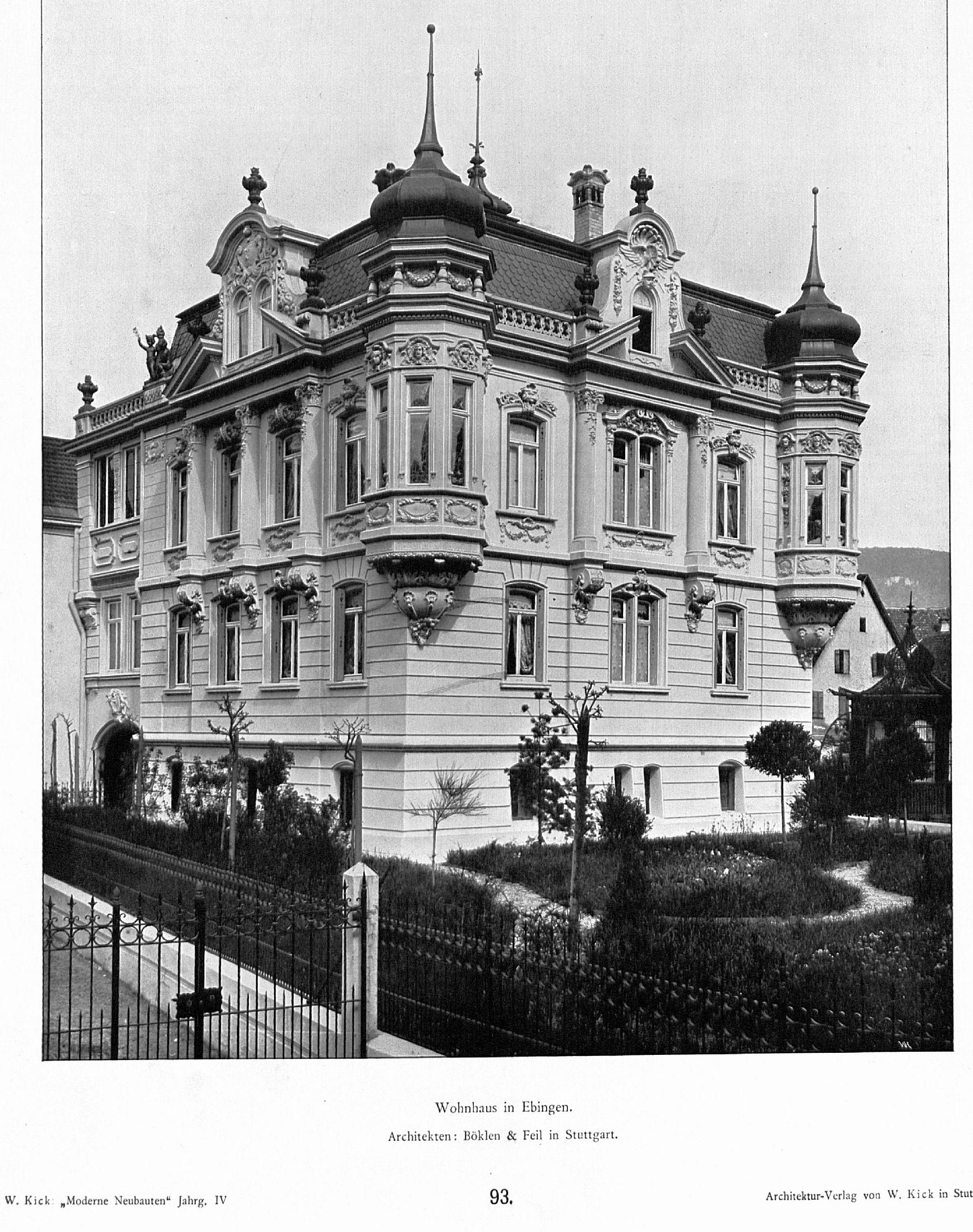 Alte Villa Haux in (Albstadt-) Ebingen, Gartenstraße; 1898 aus älterem Wohn- und Geschäftshaus umgebaut durch die Stuttgarter Architekten Richard Böklen und Carl Feil; 1907 auf ein benachbartes Grundstück verschoben